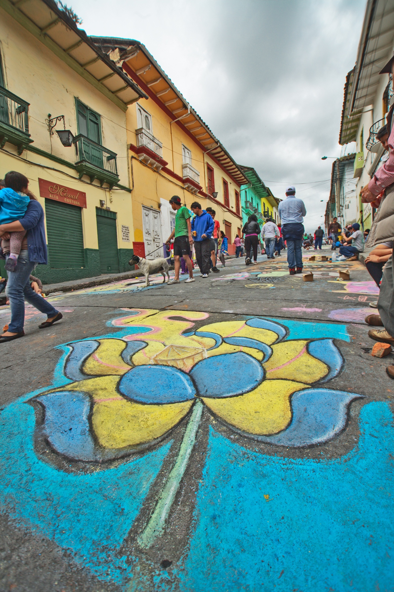 Imagen del evento "Arcoiris en el asfalto", el 28 de diciembre de 2014, parte del precarnaval de 2015.